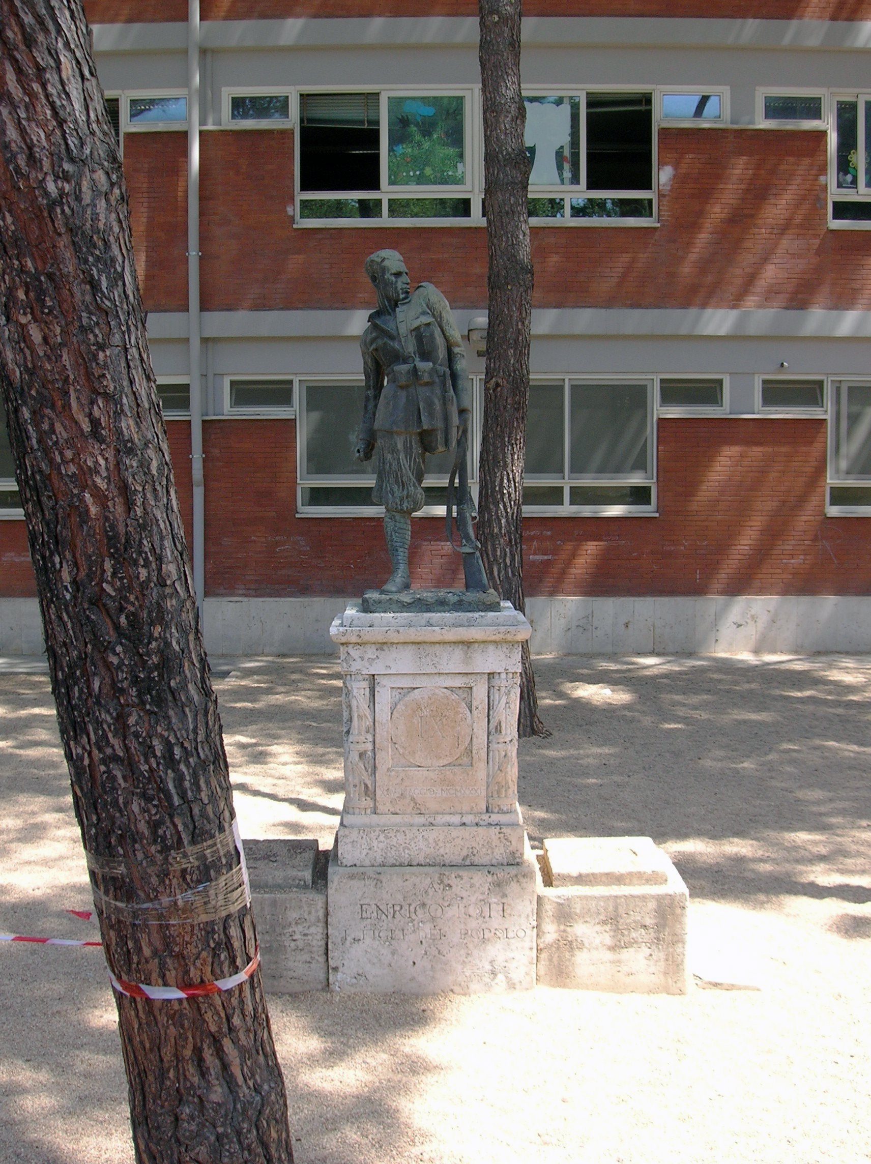 Statua di Enrico Toti nel cortile della scuola omonima